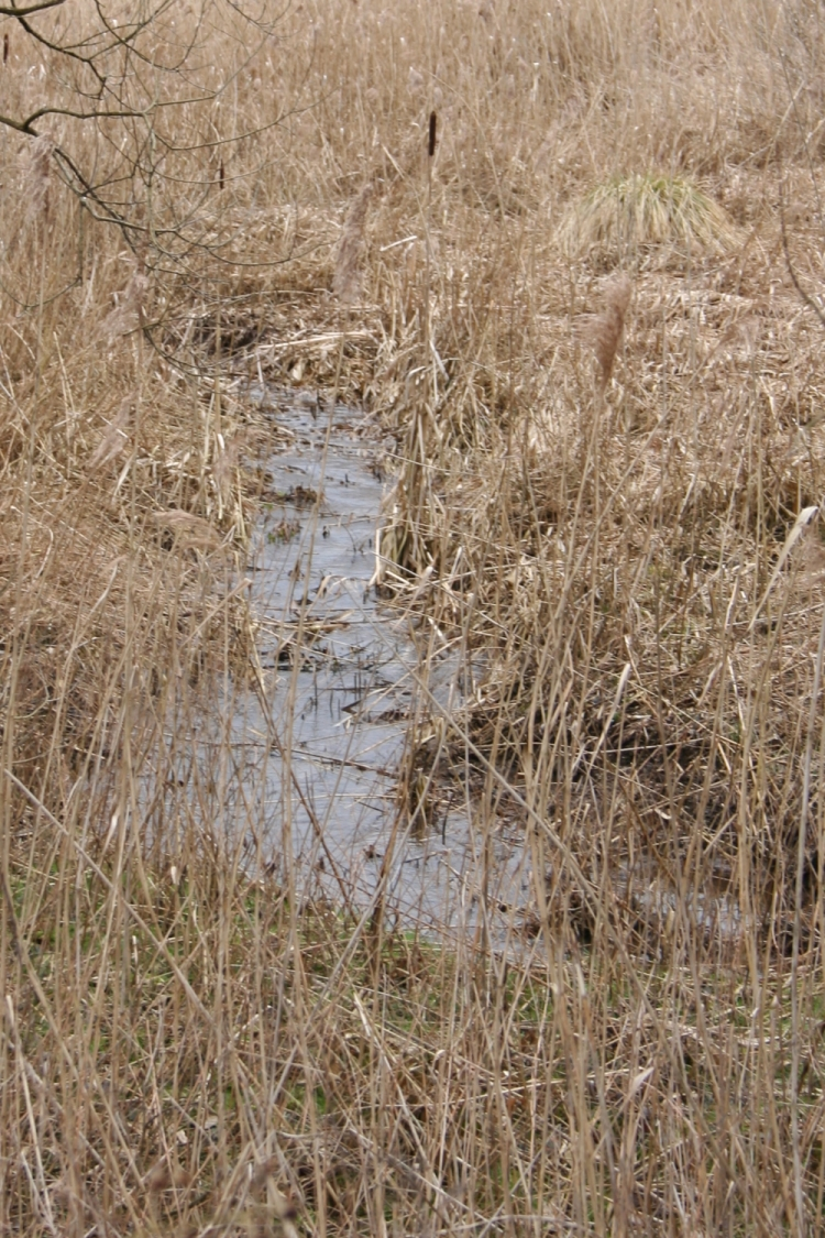 Sujet: D'Birelerbaach am Fiichtgebitt op der Héicht vun der Neimillen Source: eege Foto Tomateus (Mäerz 2006) Lizenz